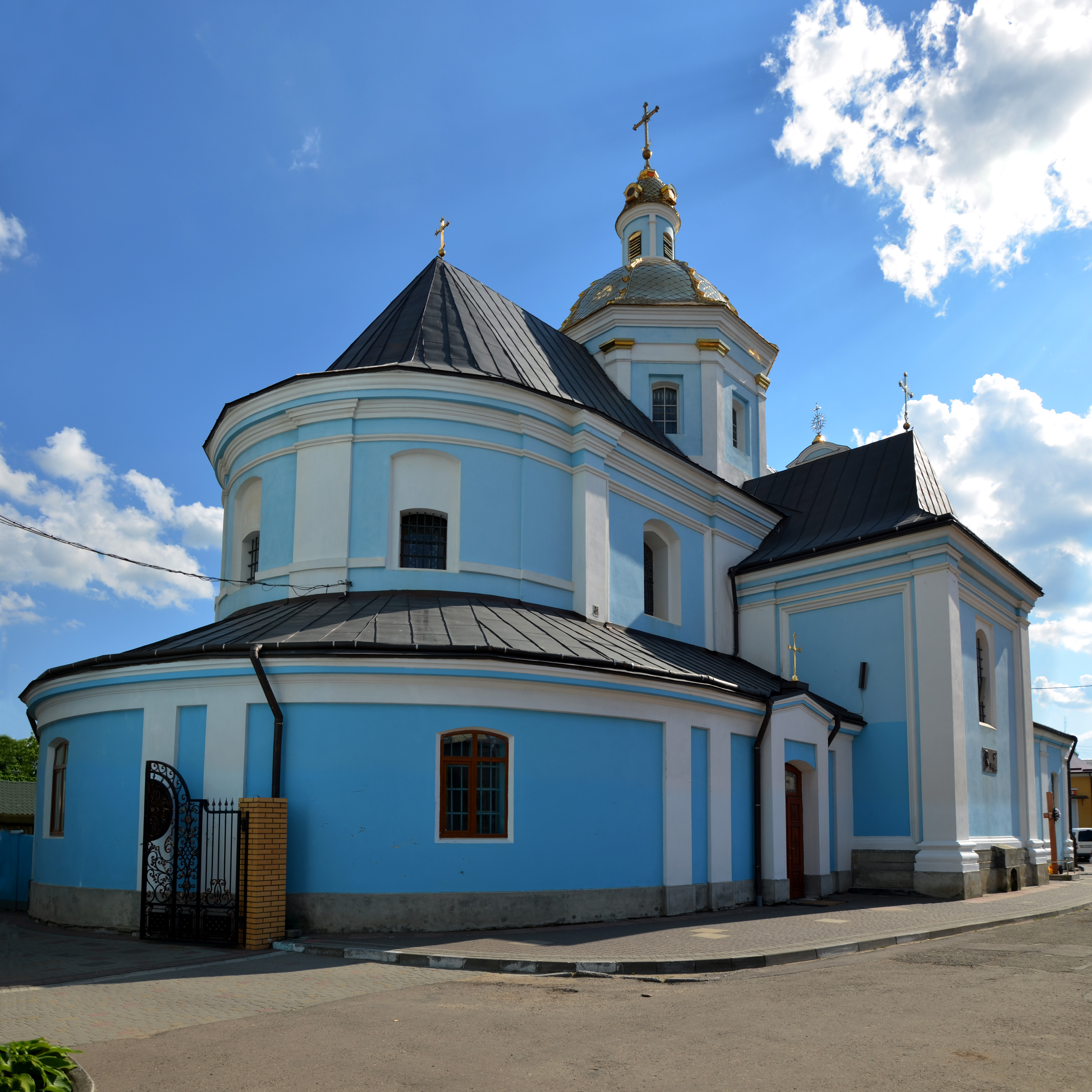 Церква Різдва Богородиці у Самборі